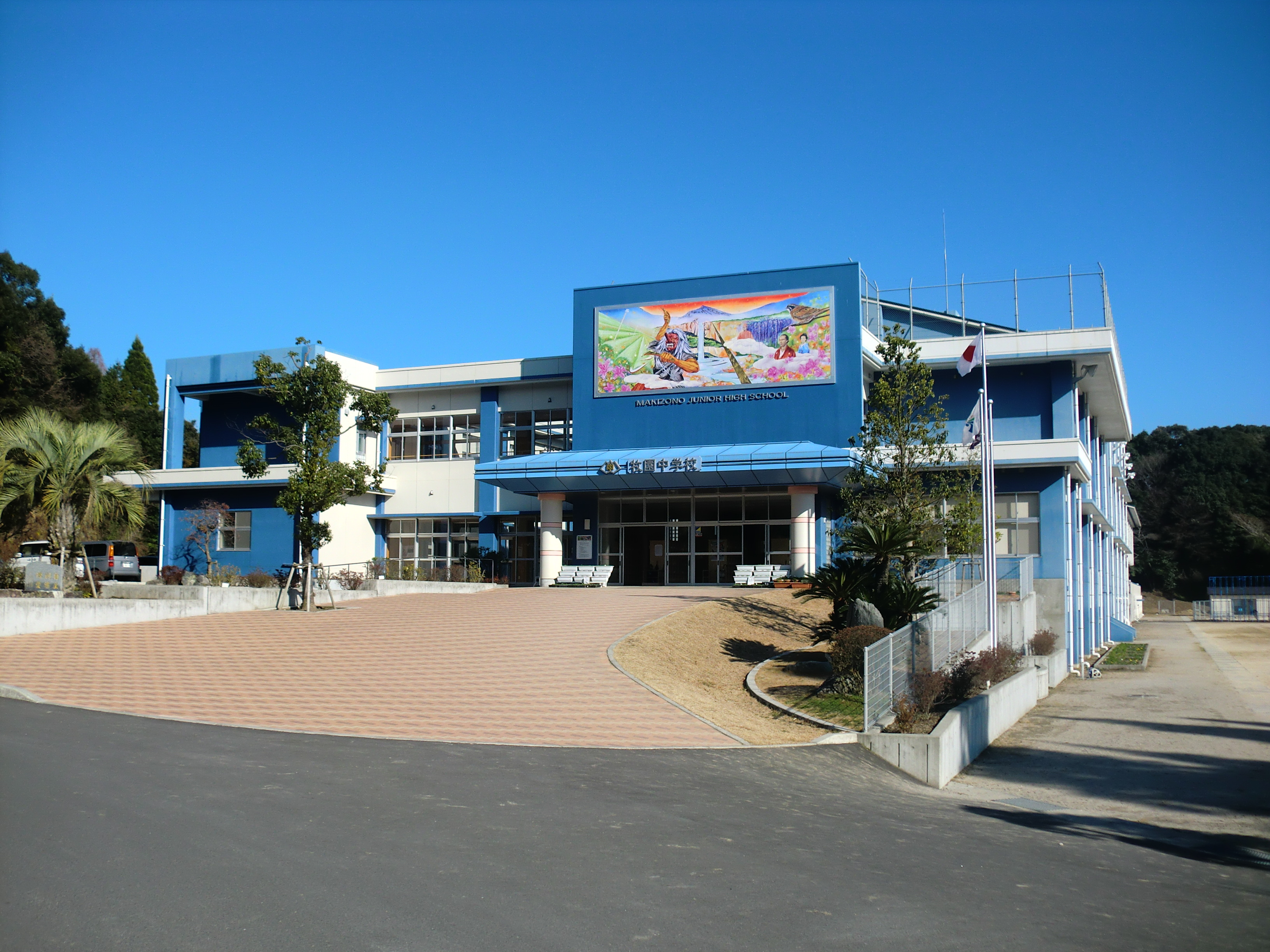 霧島市にある霧島市立牧園中学校